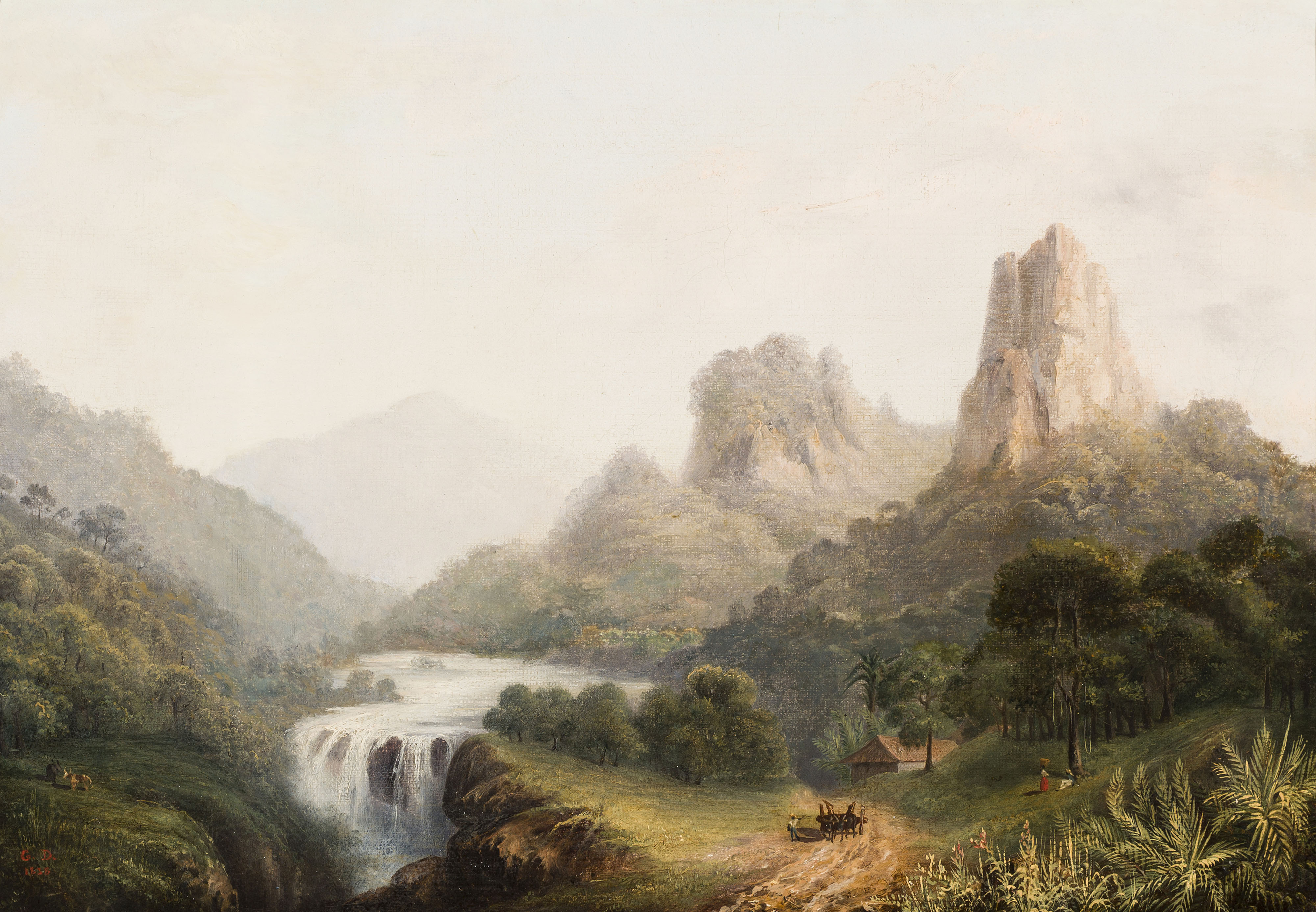 Obra da coleção Brasiliana Iconográfica.